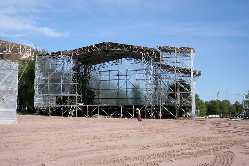 Rakenteilla oleva pääesiintymislava Raumanmeren juhannus-festareilla